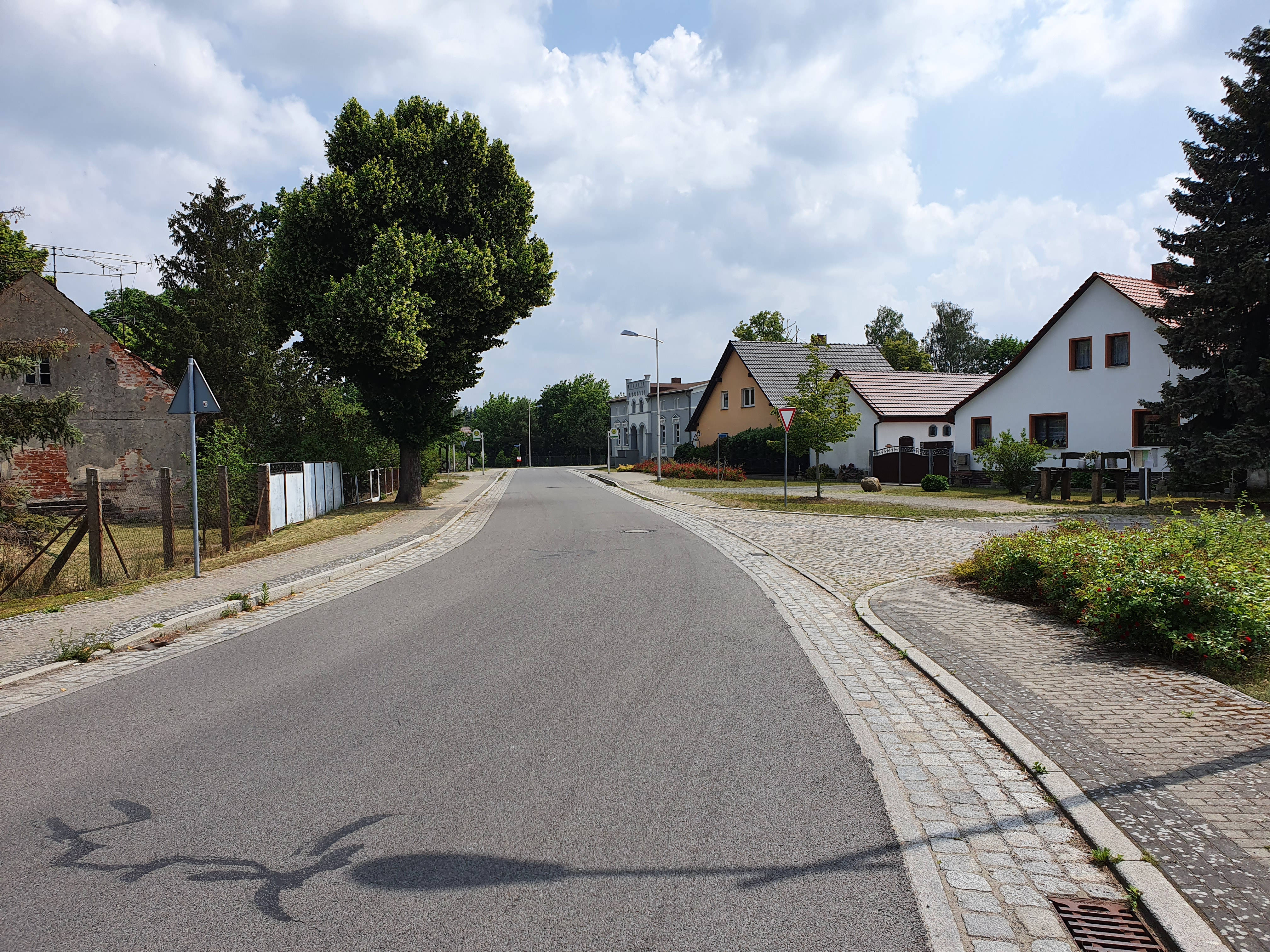 Durchgangsstraße im Ortszentrum von Ruben mit Blick in Richtung Papitz.